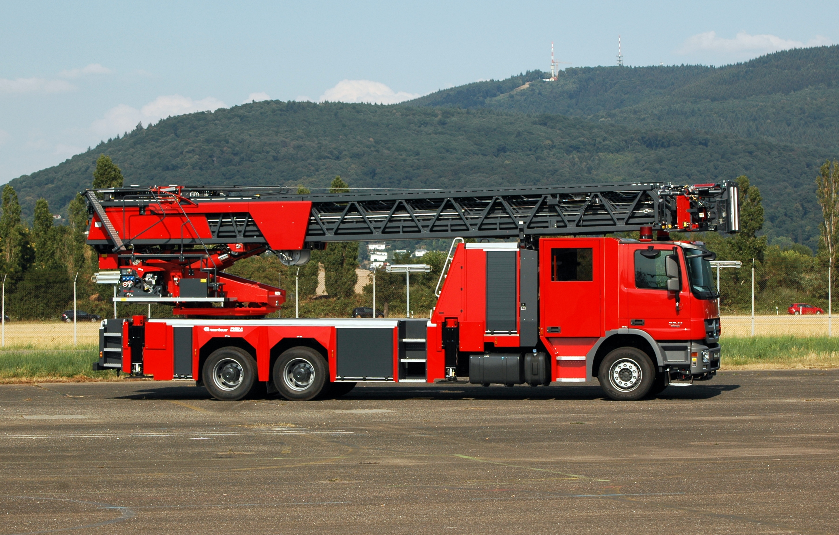 Heidelberg Airfield - Mercedes-Benz Actros 3341 - Rosenbauer